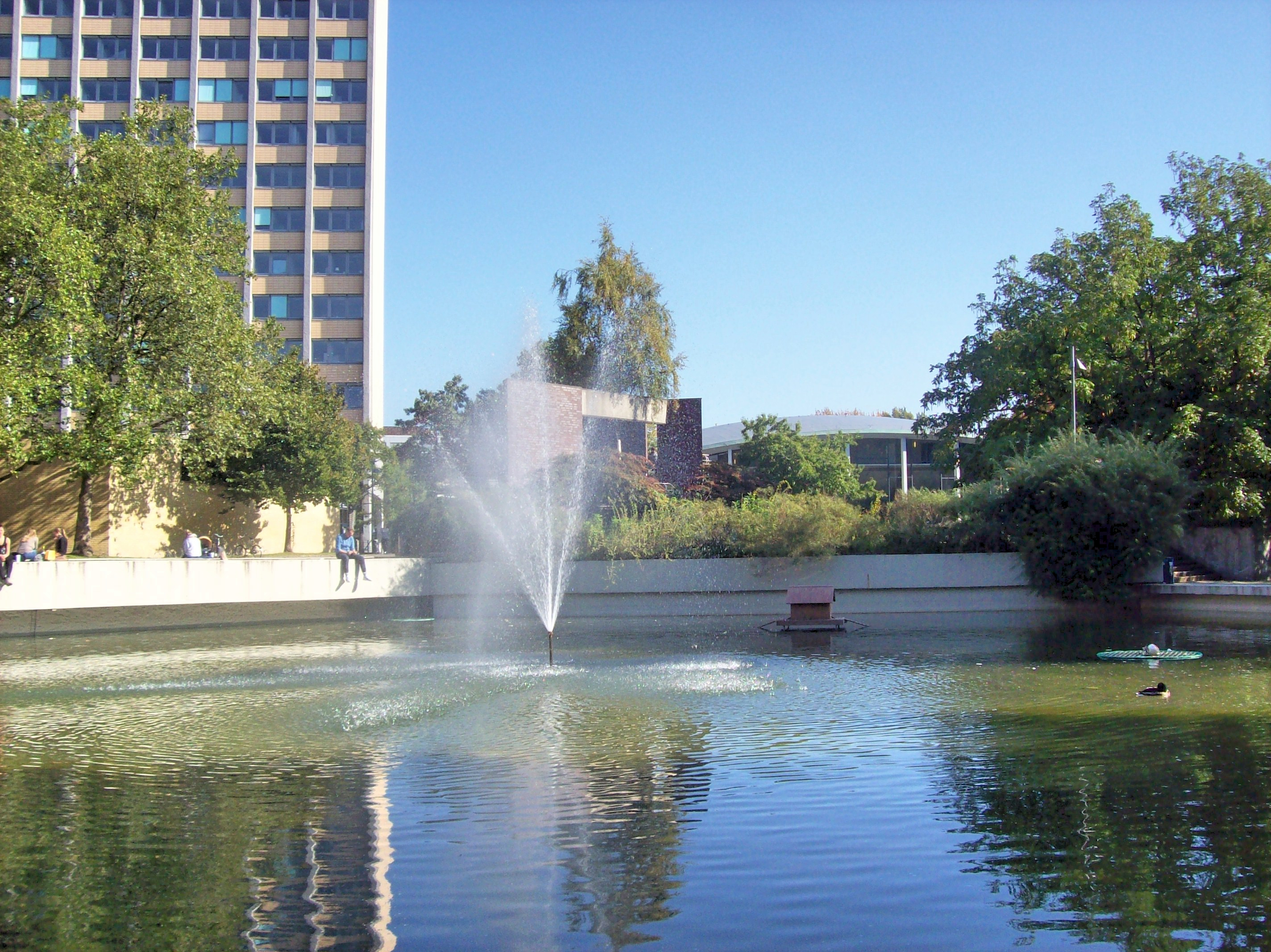 Uni Hamburg, Teil des Ensembles am Von-Melle-Park, Rotherbaum. Im Foto der Springbrunnen, links dahinter der Phil-Turm, in der Mitte die Tribüne und rechts eine Teilansicht vom Audimax .This is a photograph of an architectural monument.